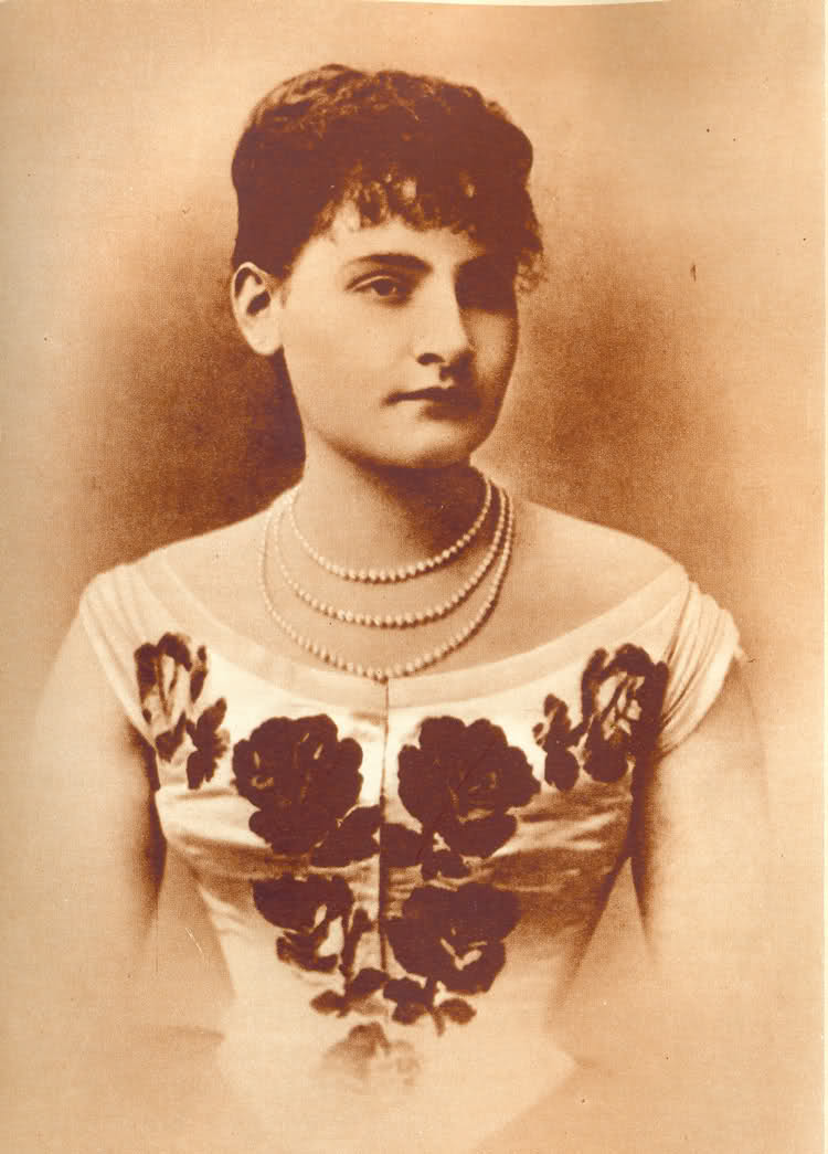 Artemiza Joanides Hristić, ljubavnica kralja Milana I Obrenovića, sa kojim je imala sina Djordja